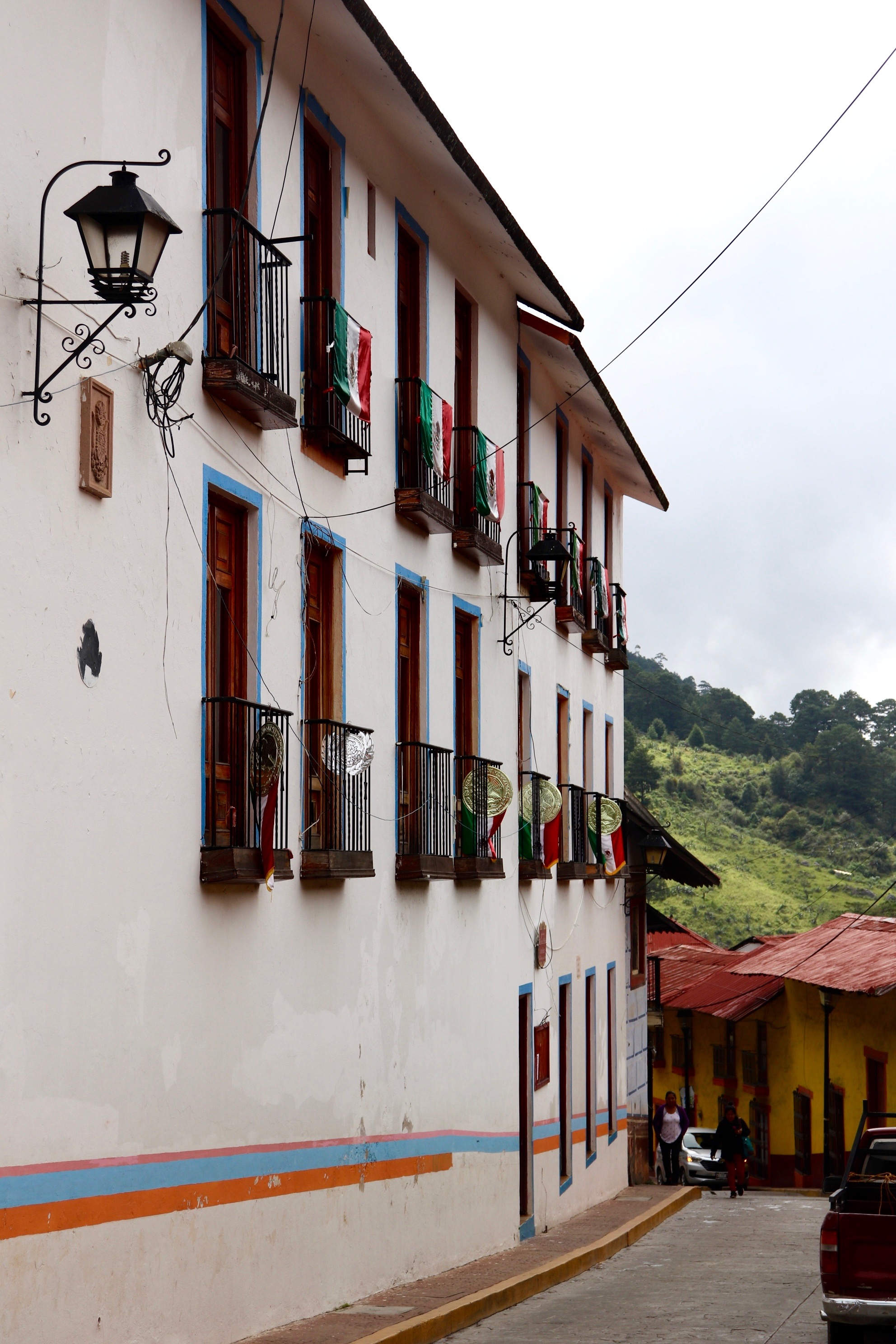 Fachada principal de la biblioteca pública de Pinal de Amoles, Querétaro, México